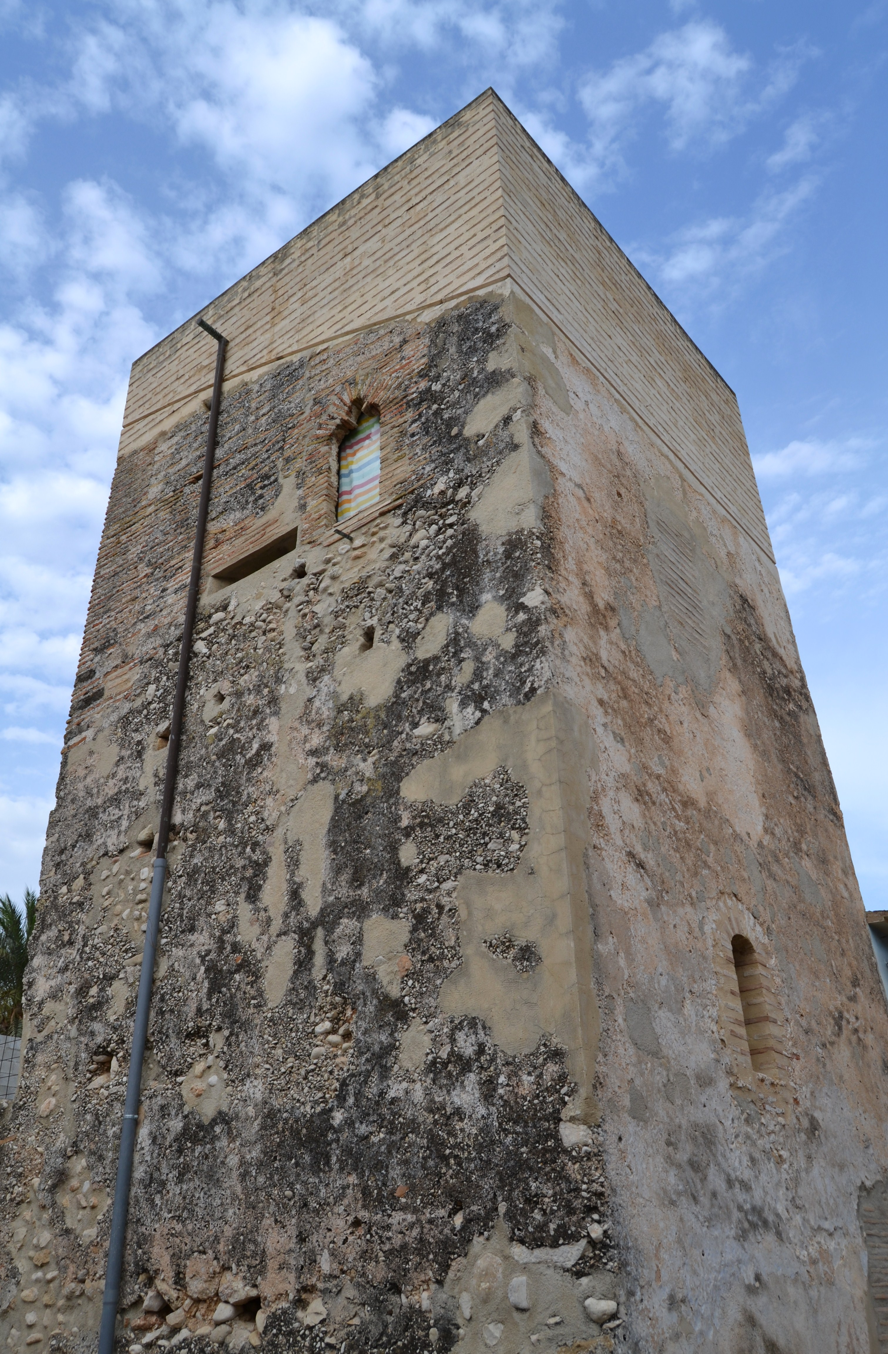 Torre de Mira-rosa o dels Poblets.